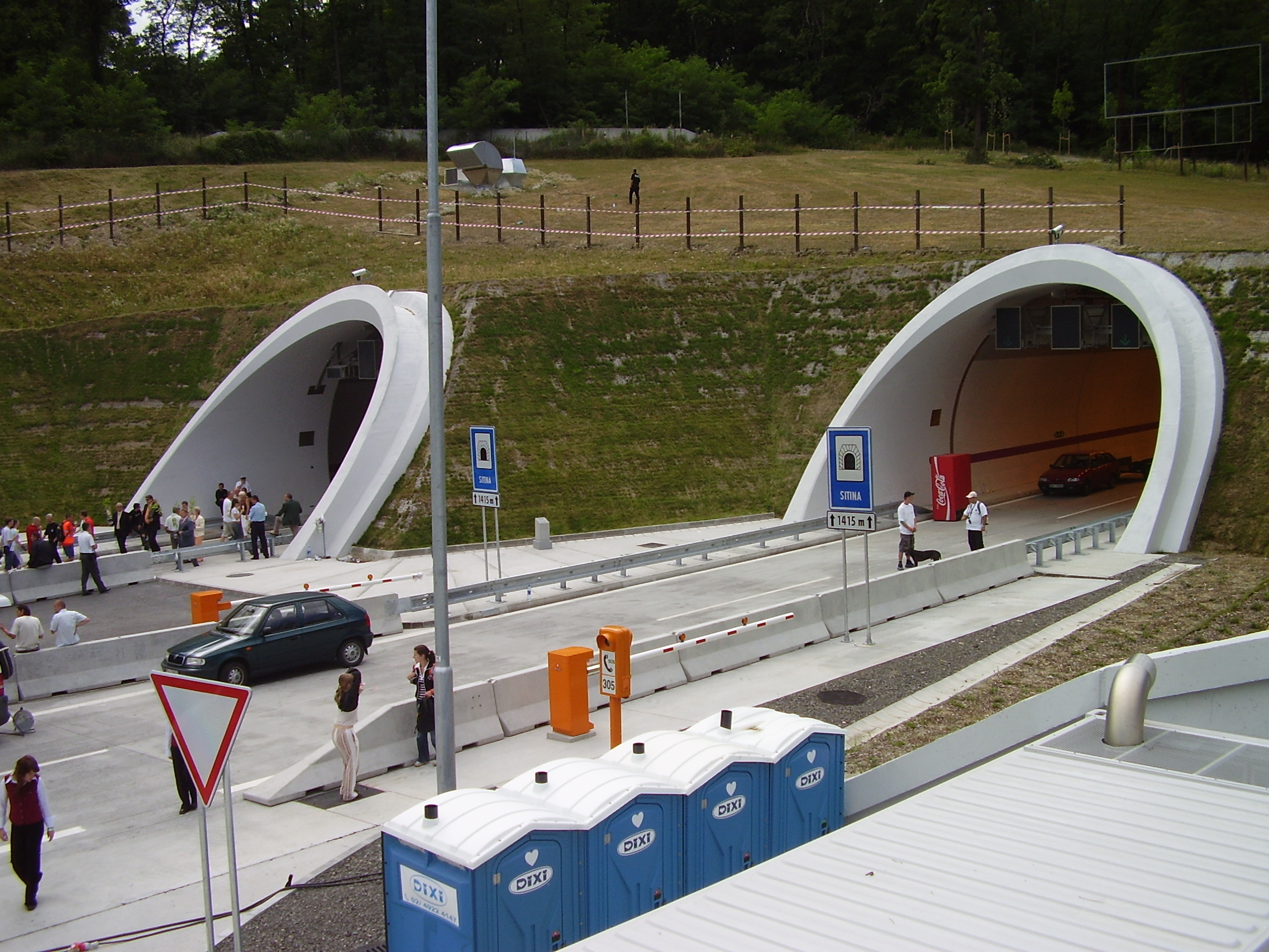 Sitina Tunnel, Bratislava